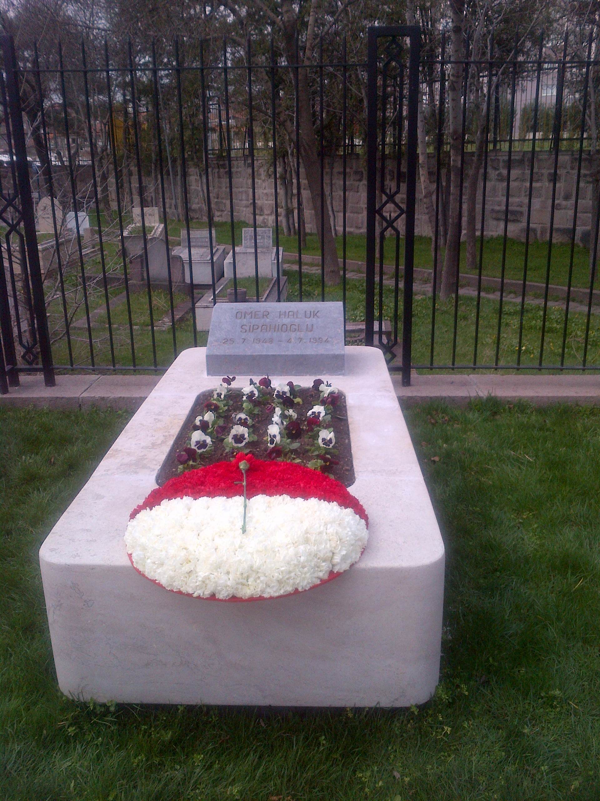 Ömer Haluk Sipahioğlu, Consejero de la Embajada de Turquia en Atenas, fue asesinado por el organismo terorista griego 17 Noviembre.